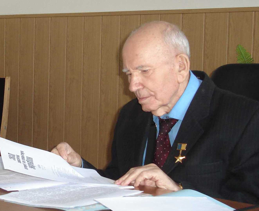 Тронько Петро Тимофійович, академік НАН України